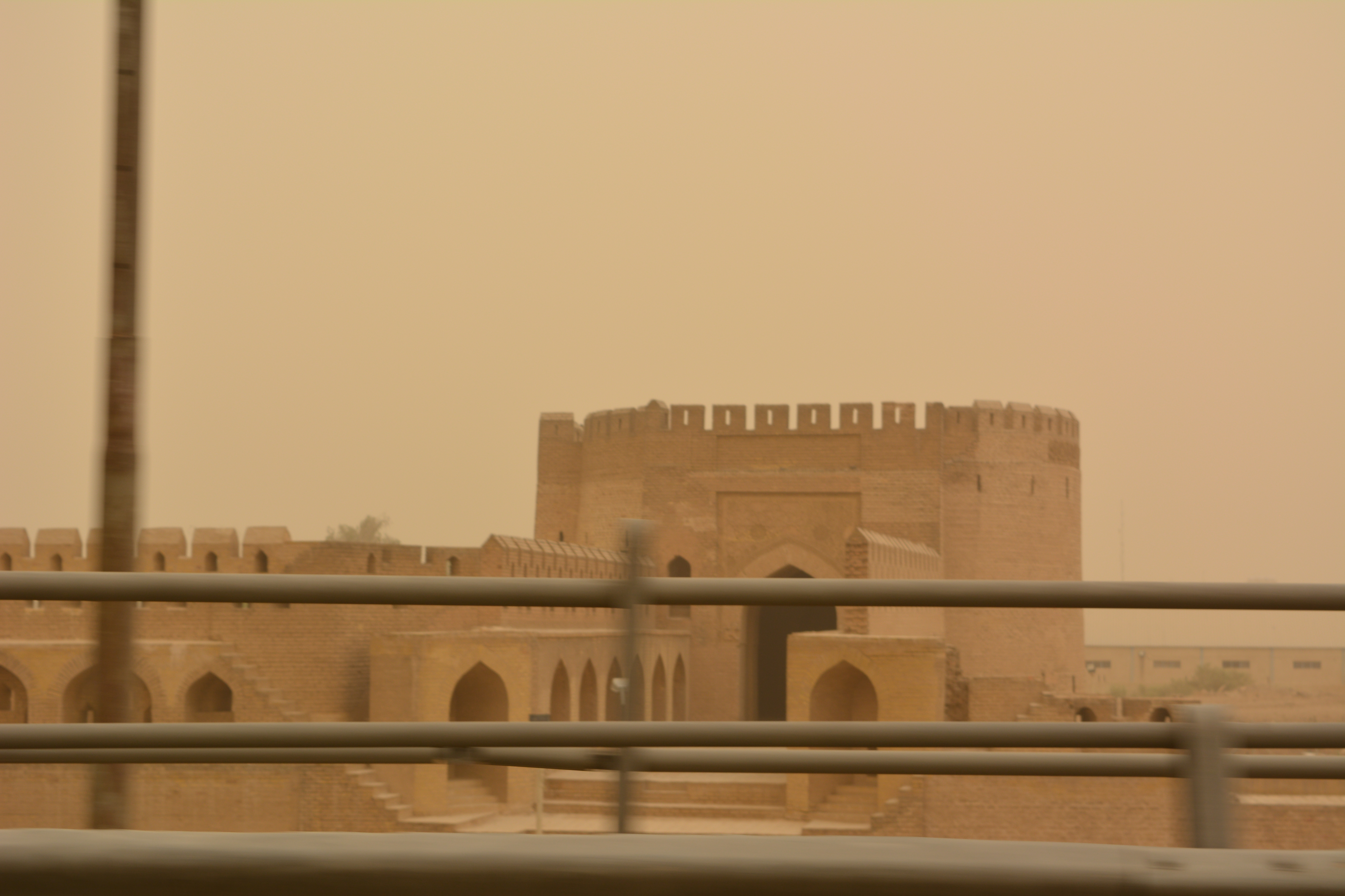 الباب الوسطاني الذي يقع في جانب الرصافة من بغداد وهو آخر ما تبقى من ابواب سور بغداد القديمة